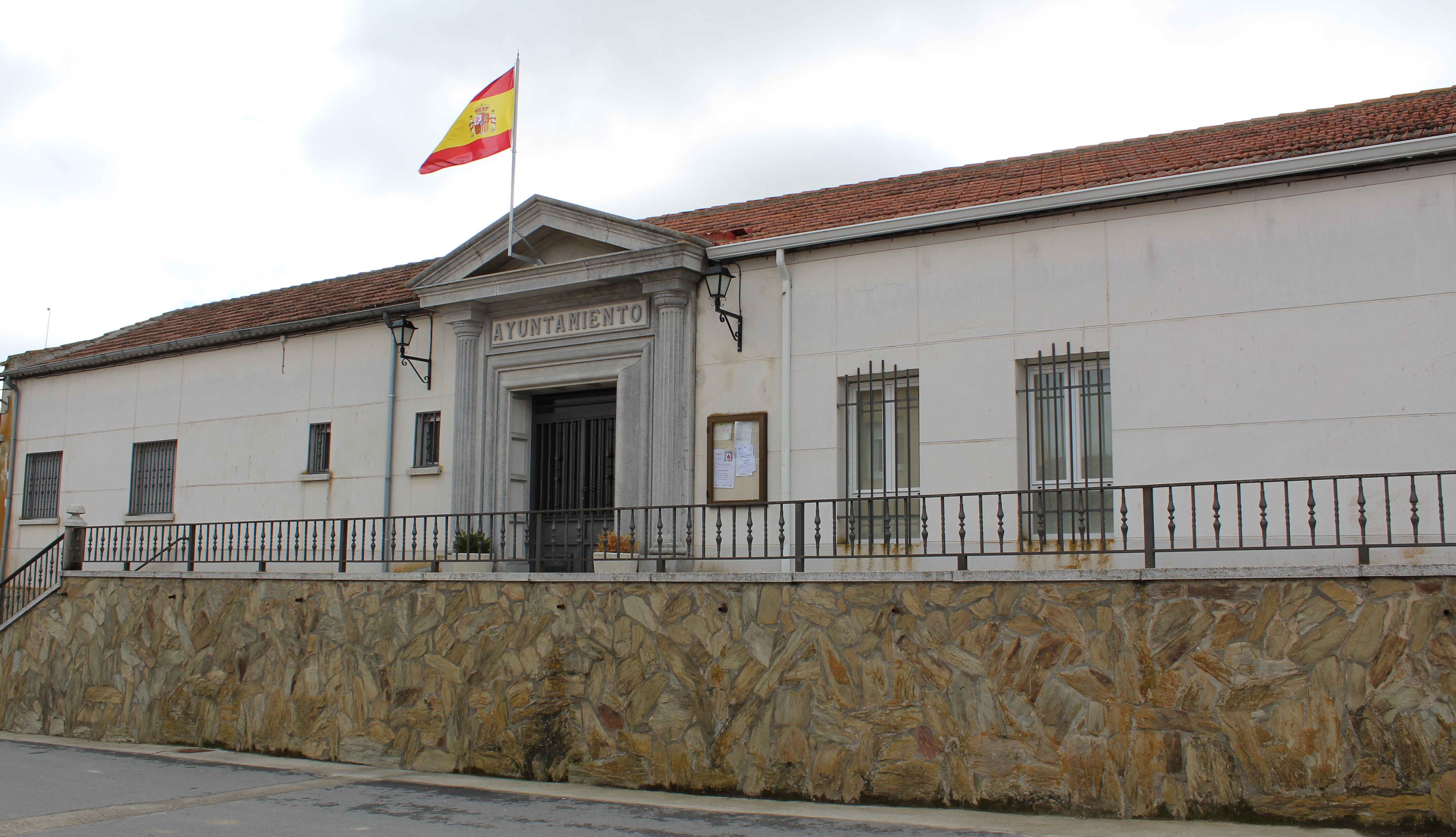 Ayuntamiento de Navales, provincia de Salamanca